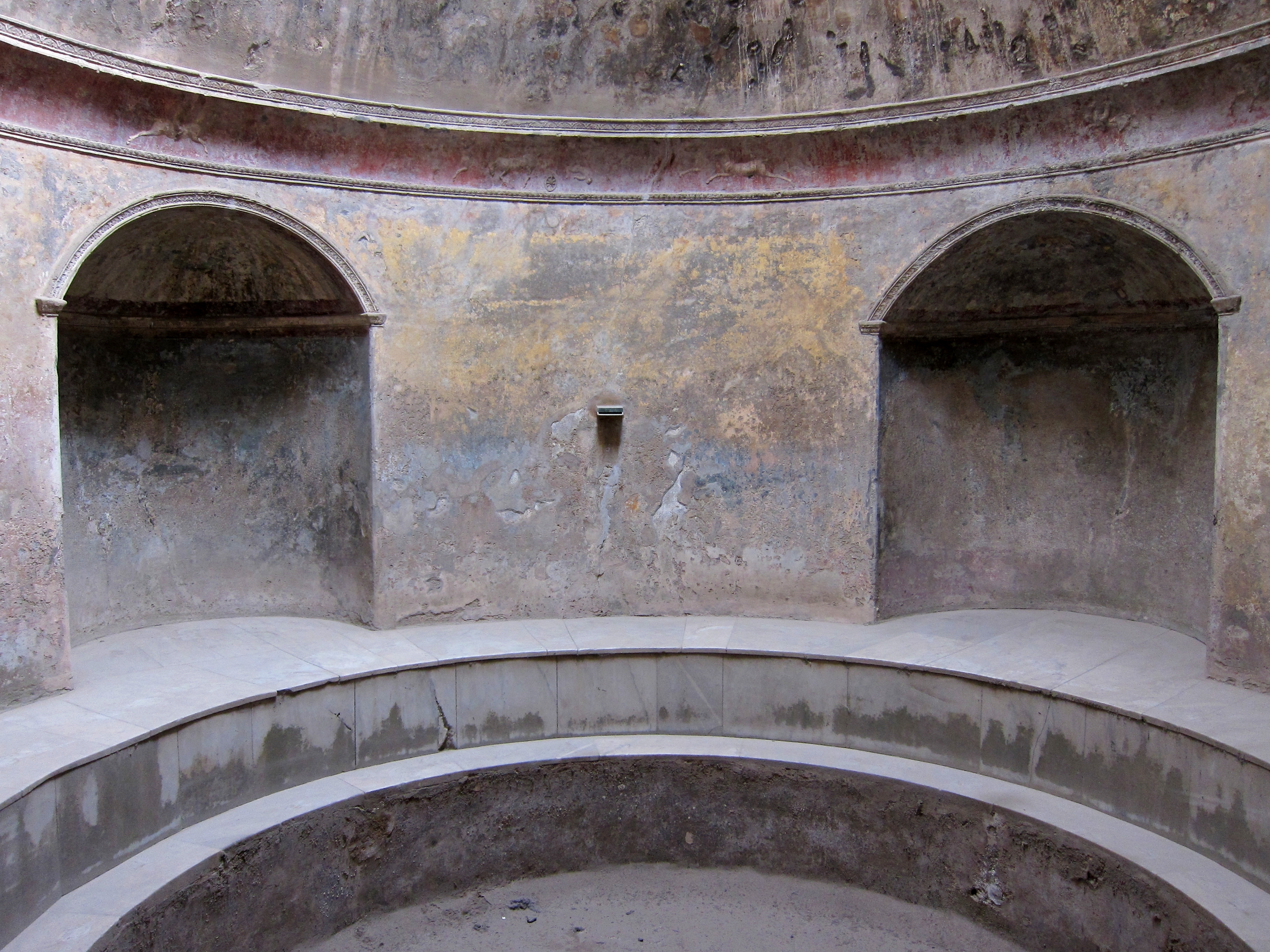 Bassin des thermes de Pompei (Italie).